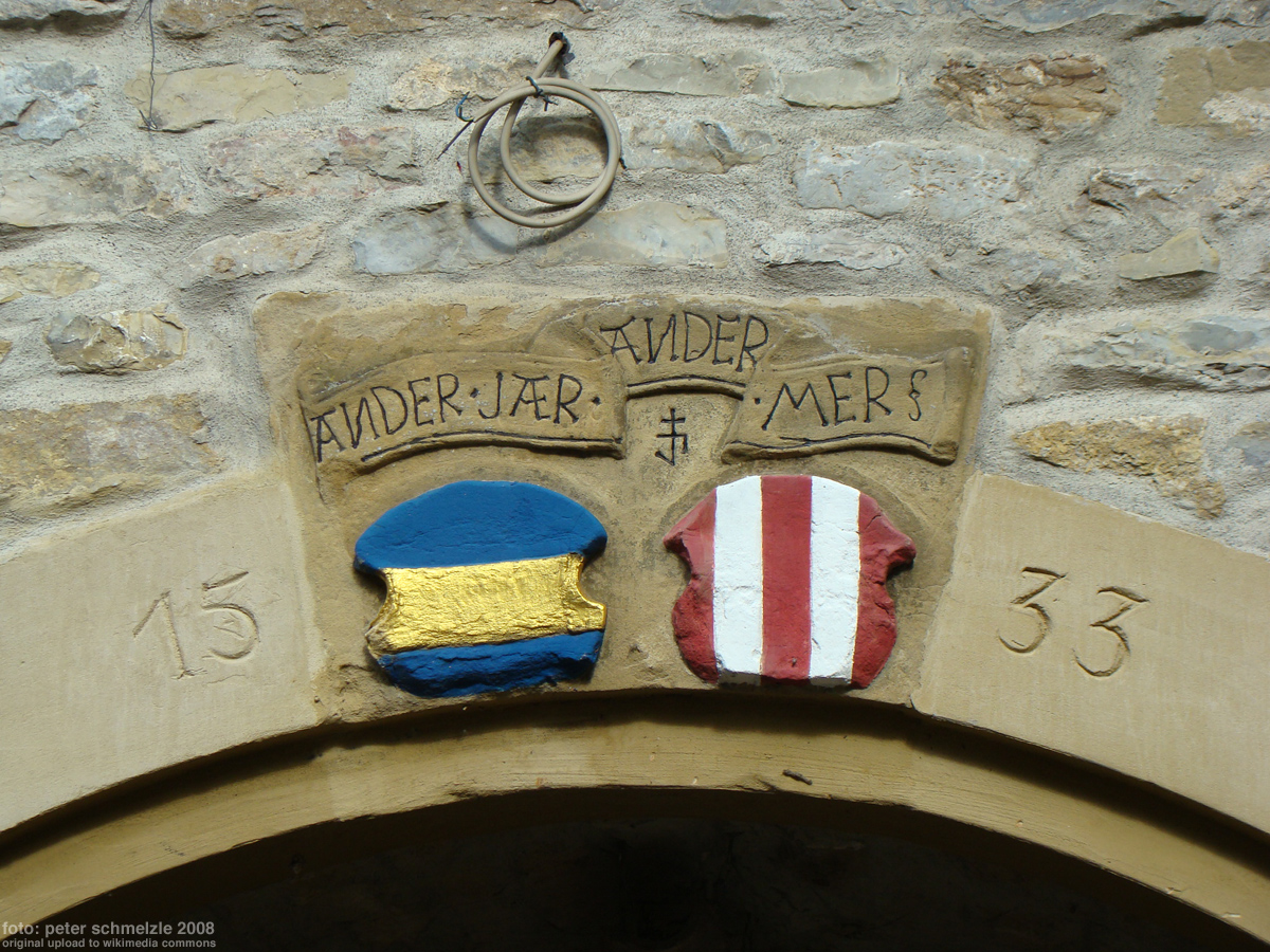 Schloss Oedheim, Allianzwappen Capler-Bibelheim am Nordostbau – am Tag des offenen Denkmals 2008